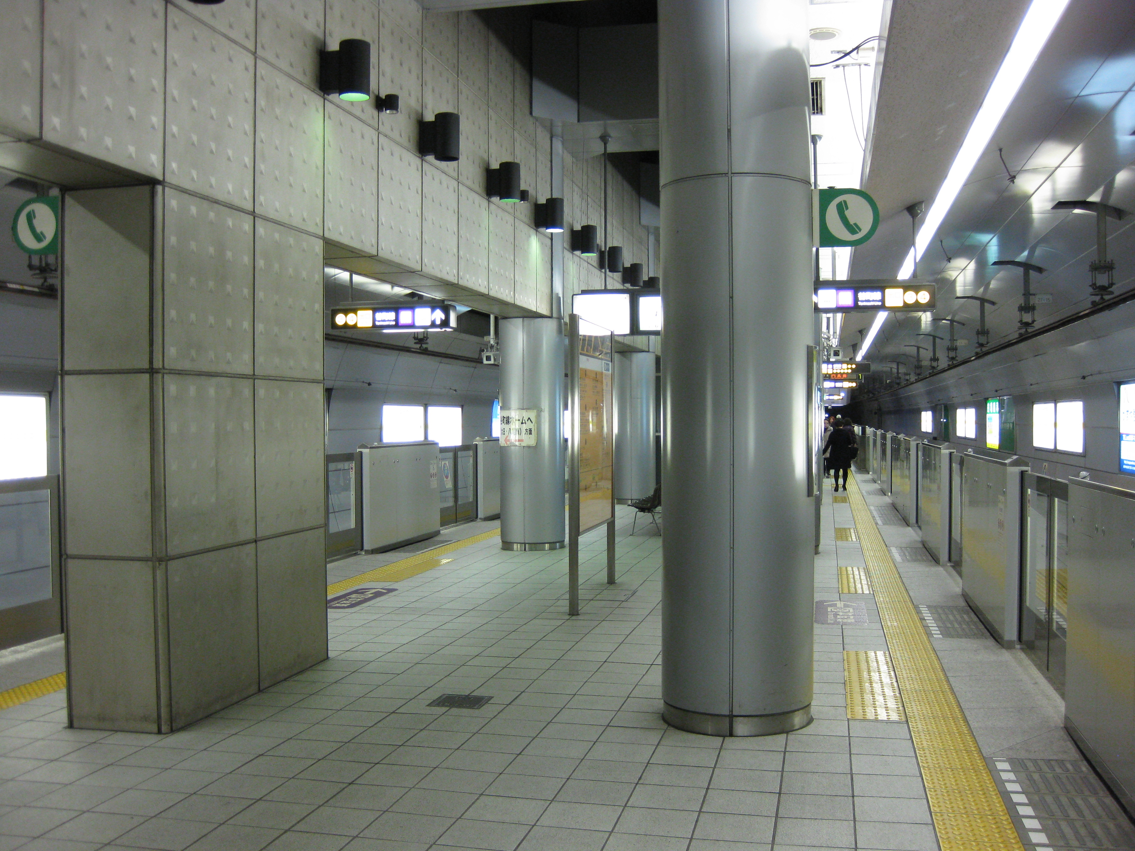 谷町六丁目駅長堀鶴見緑地線プラットホーム